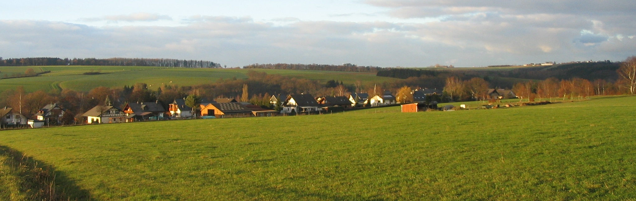 Tiefenbach im Hunsrück, vom Soonwald aus gesehen